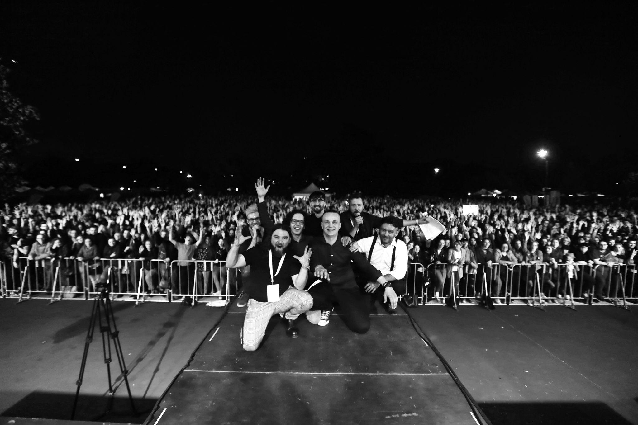 Eleanor Gray robi sobie pamiątkowe zdjęcie z juwenaliową publicznością. Na scenie oprócz zespołu są także prowadzący imprezę: Edgar Hein oraz Wojciech Dymaczewski.